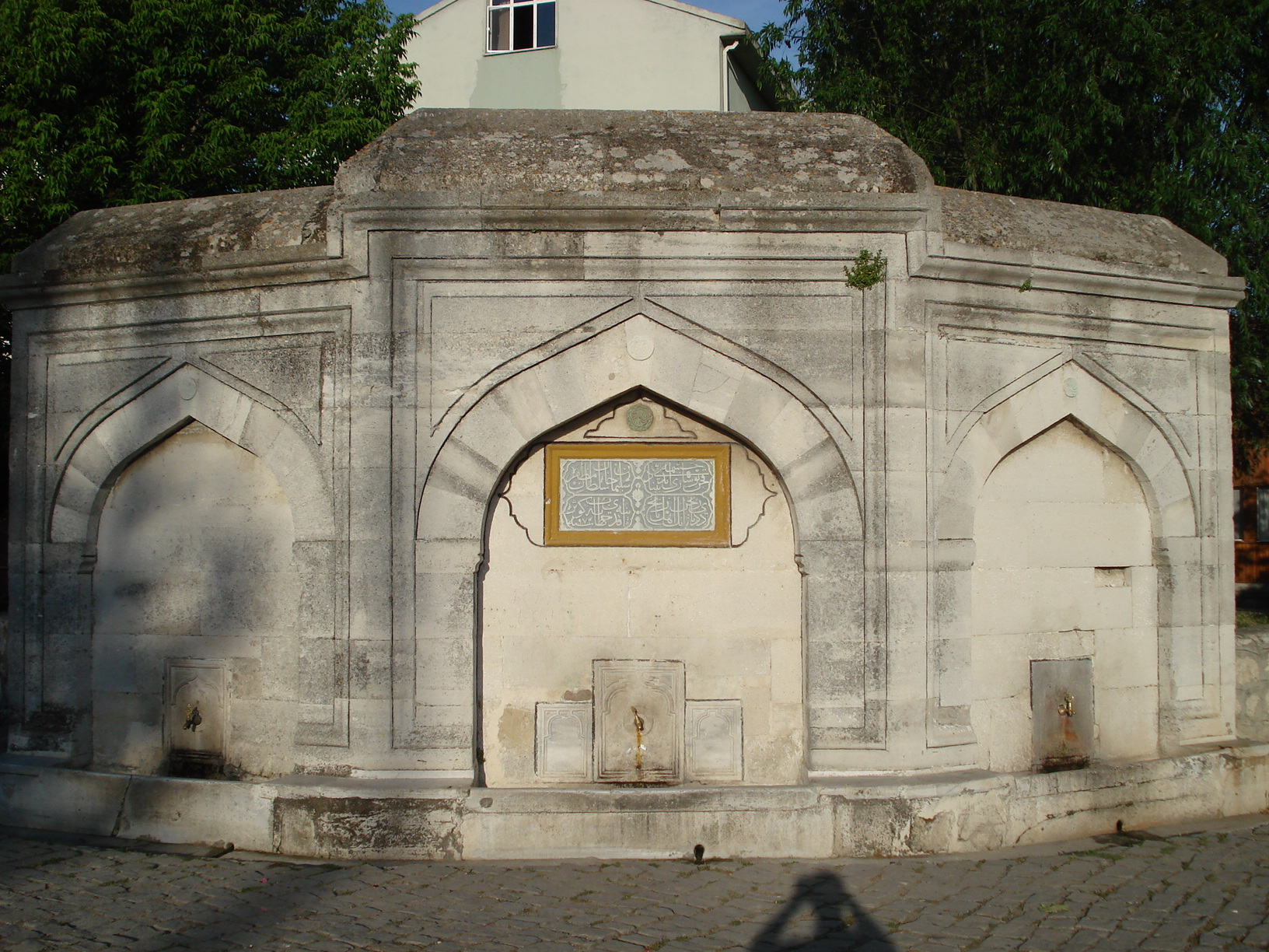 Kanuni Sultan Süleyman Fountain is built in Büyükçekmece, İstanbul by Mimar Sinan